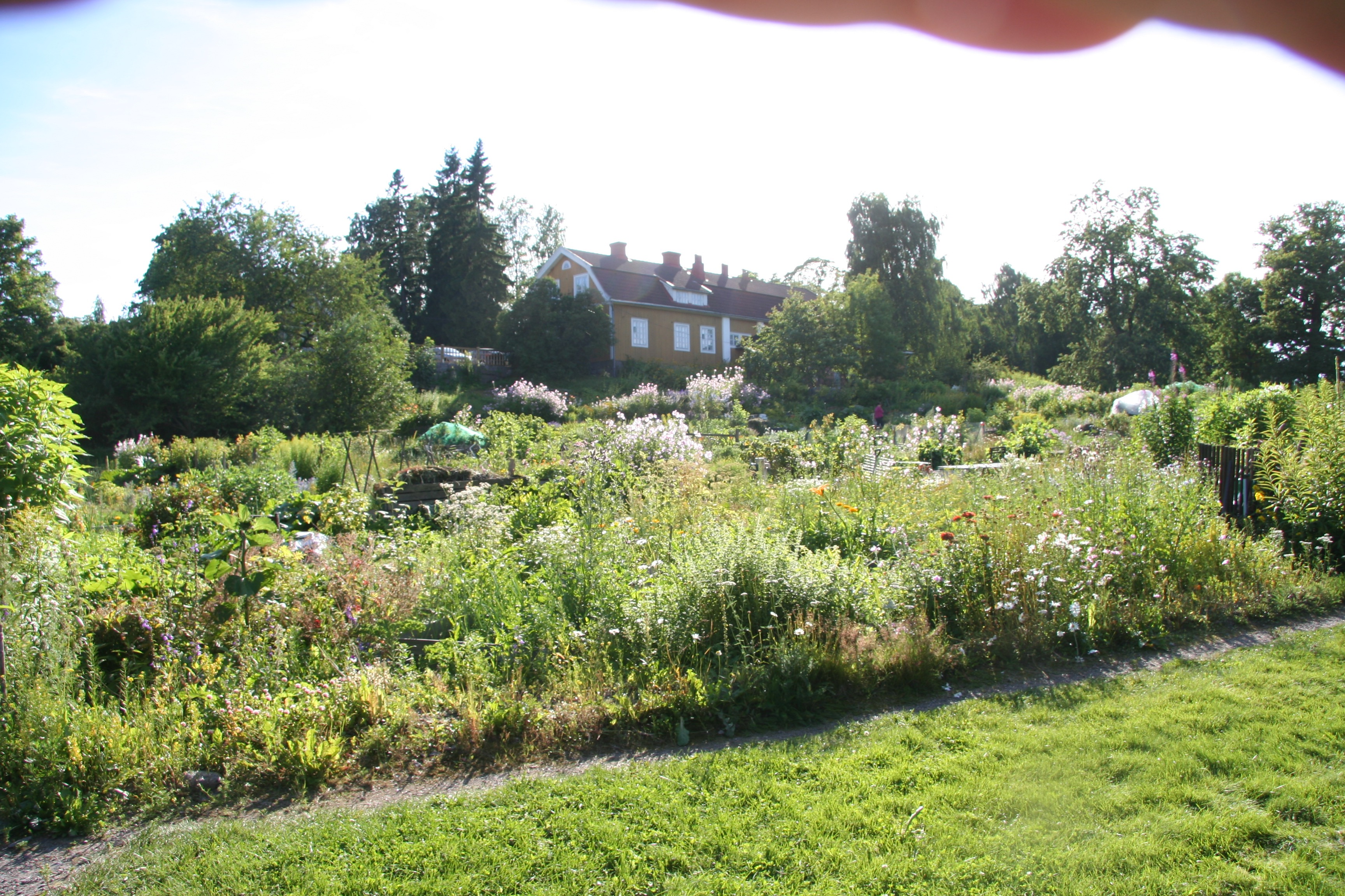 Annala, Helsinki. Hyötykasviyhdistyksen viljlelypalstoja.